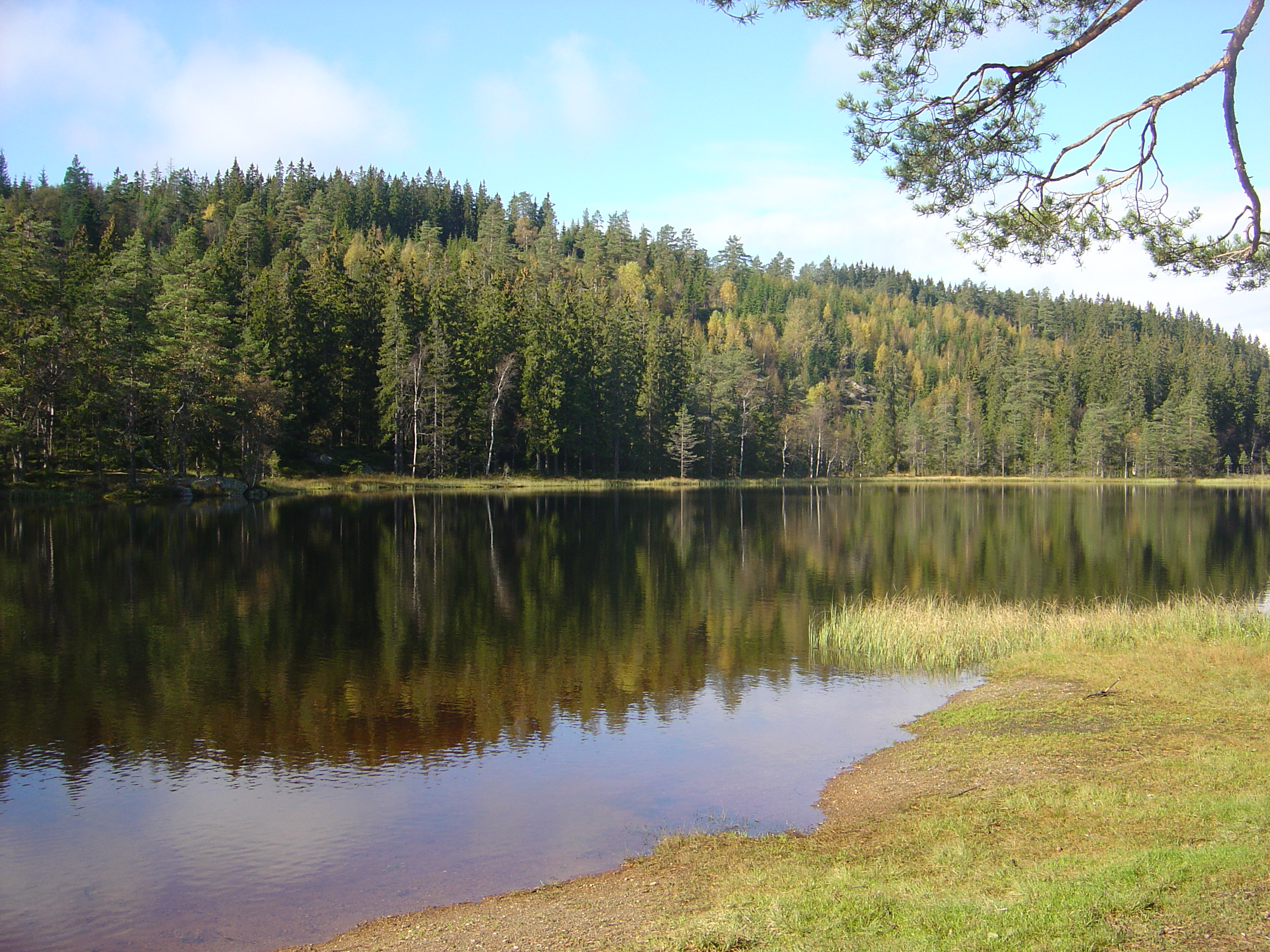 Kjulstjernet, Lillomarka, Oslo